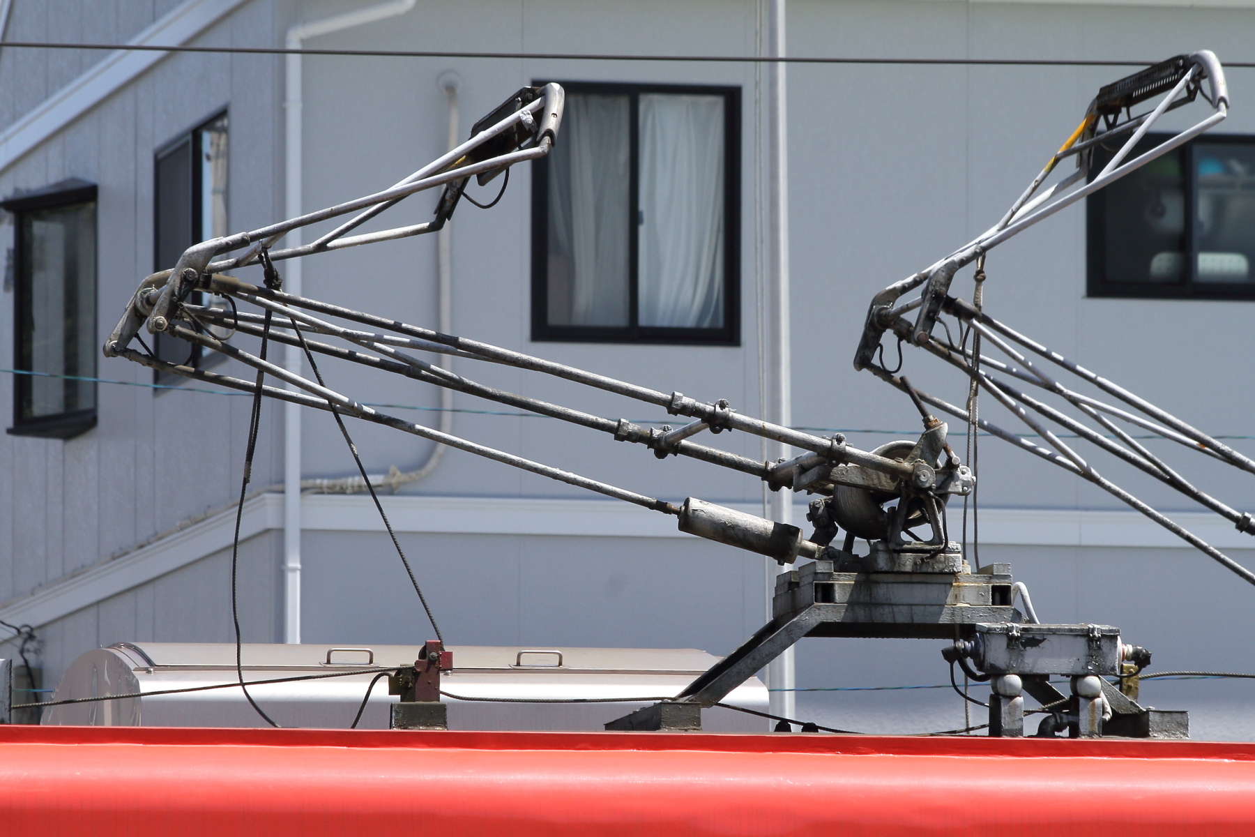 豊橋鉄道モ3500形3502のパンタグラフ